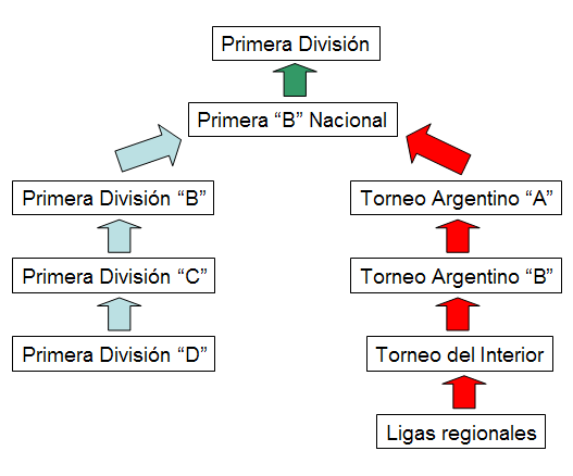 Grafico Liga Argentina de Fútbol.